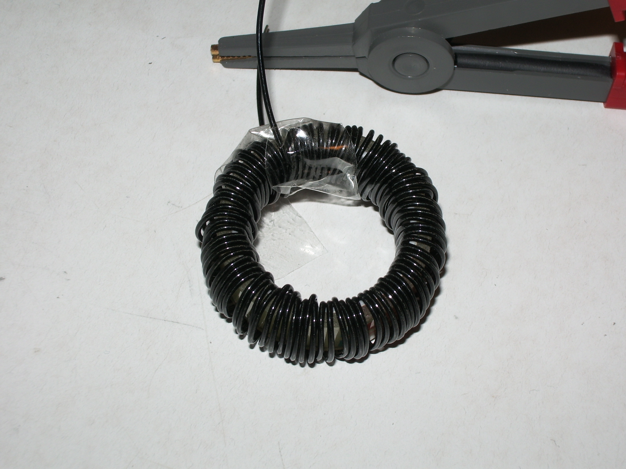 Selbstgewickelte Toroid-Luftspule auf Kunststoffkern. Durchmesser: ca. 35 mm. Induktivität: ca. 8 µH. Foto selbst aufgenommen.